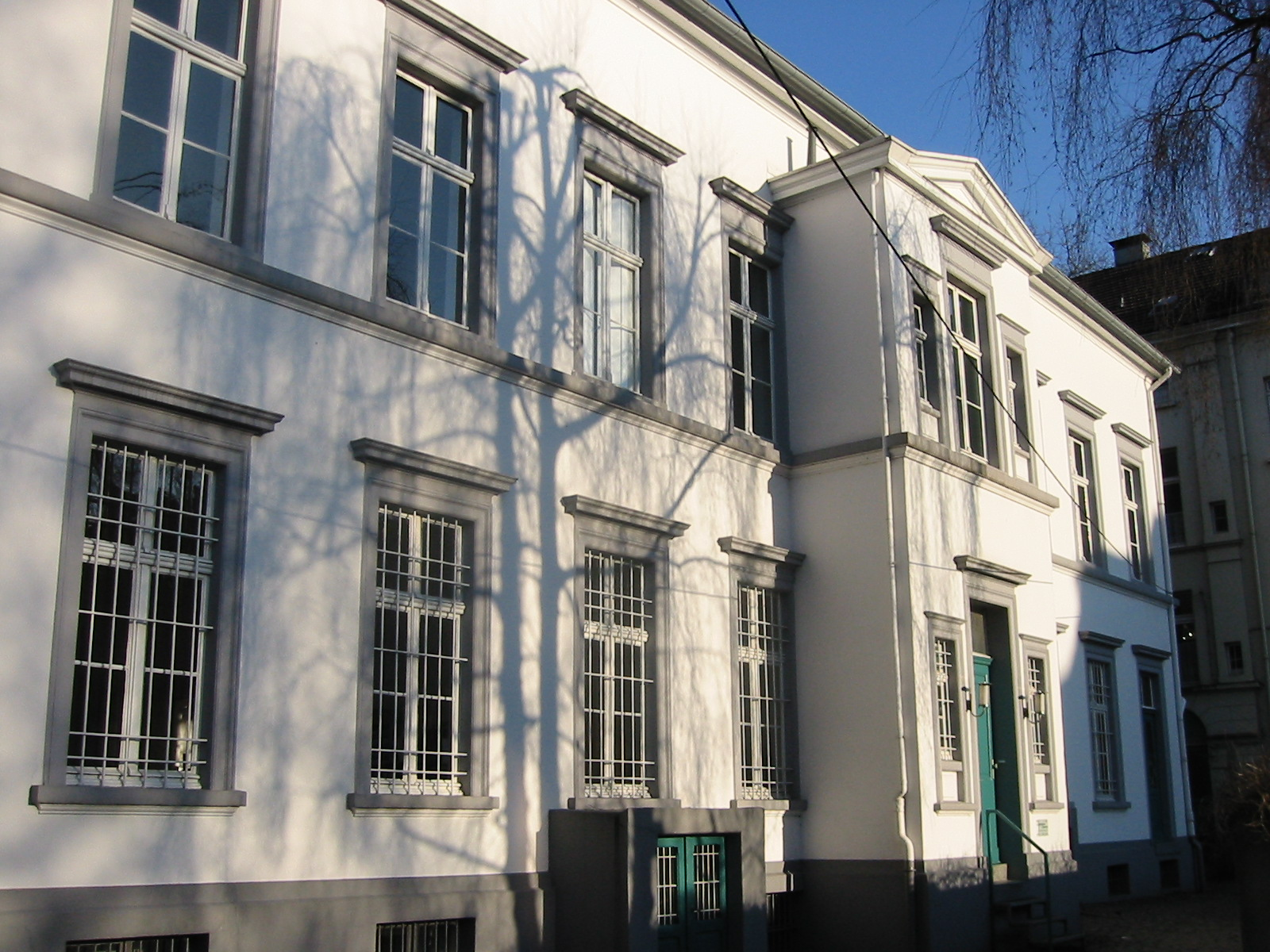 Kontorhaus der ehemaligen Bandfabrik Wilhlem Büsgen